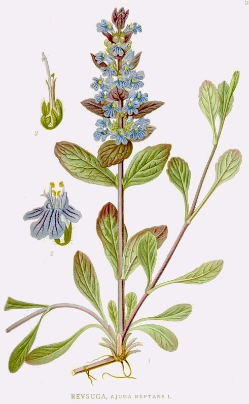 Original Description Revsuga, Ajuga reptans L.